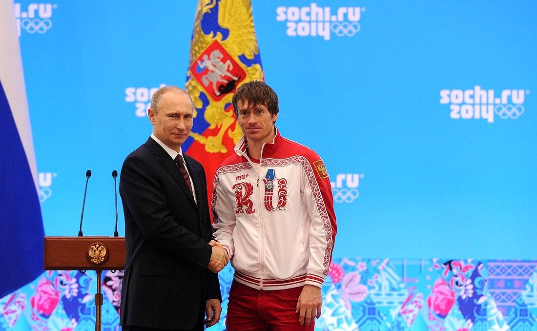 Орденом Почёта награждён трёхкратный серебряный призёр Олимпийских игр в лыжных гонках Максим Вылегжанин.